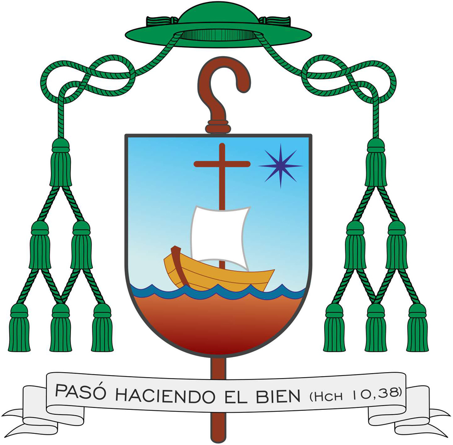 Escudo del Obispo Auxiliar de Córdoba